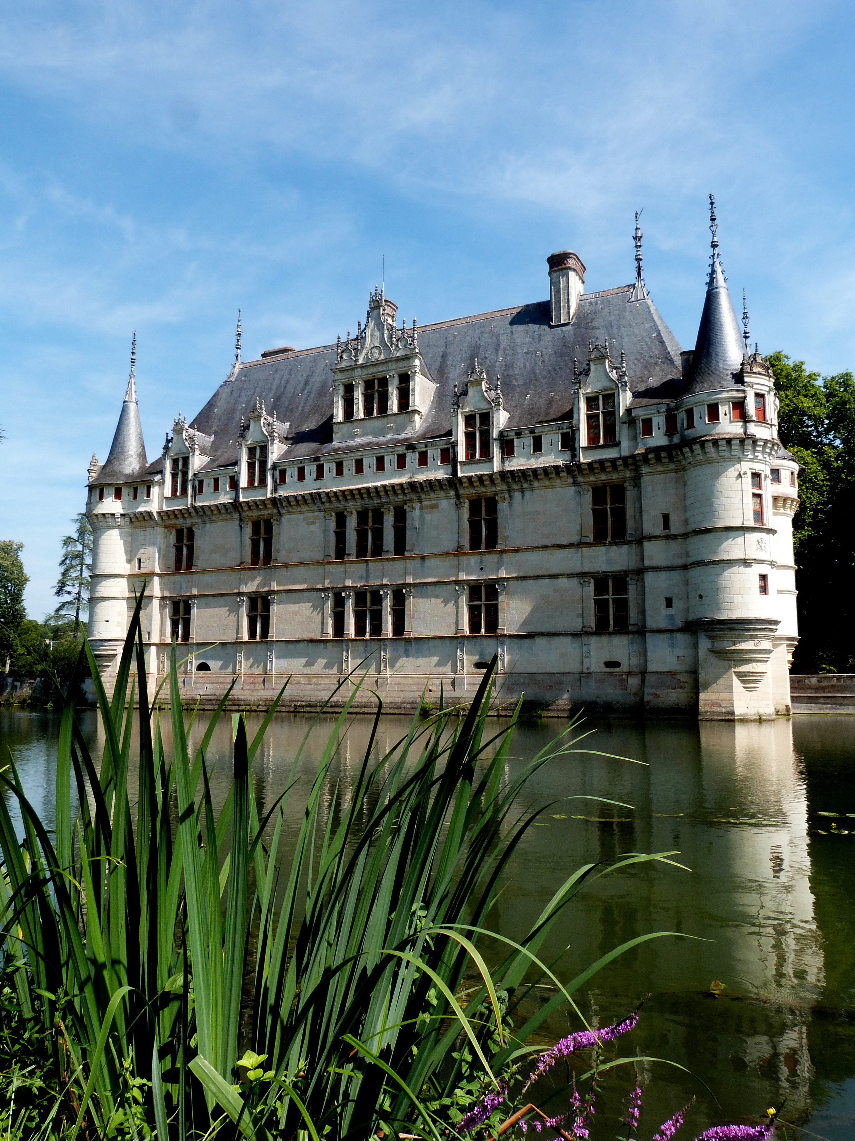 Châteaux-de-la-Loire